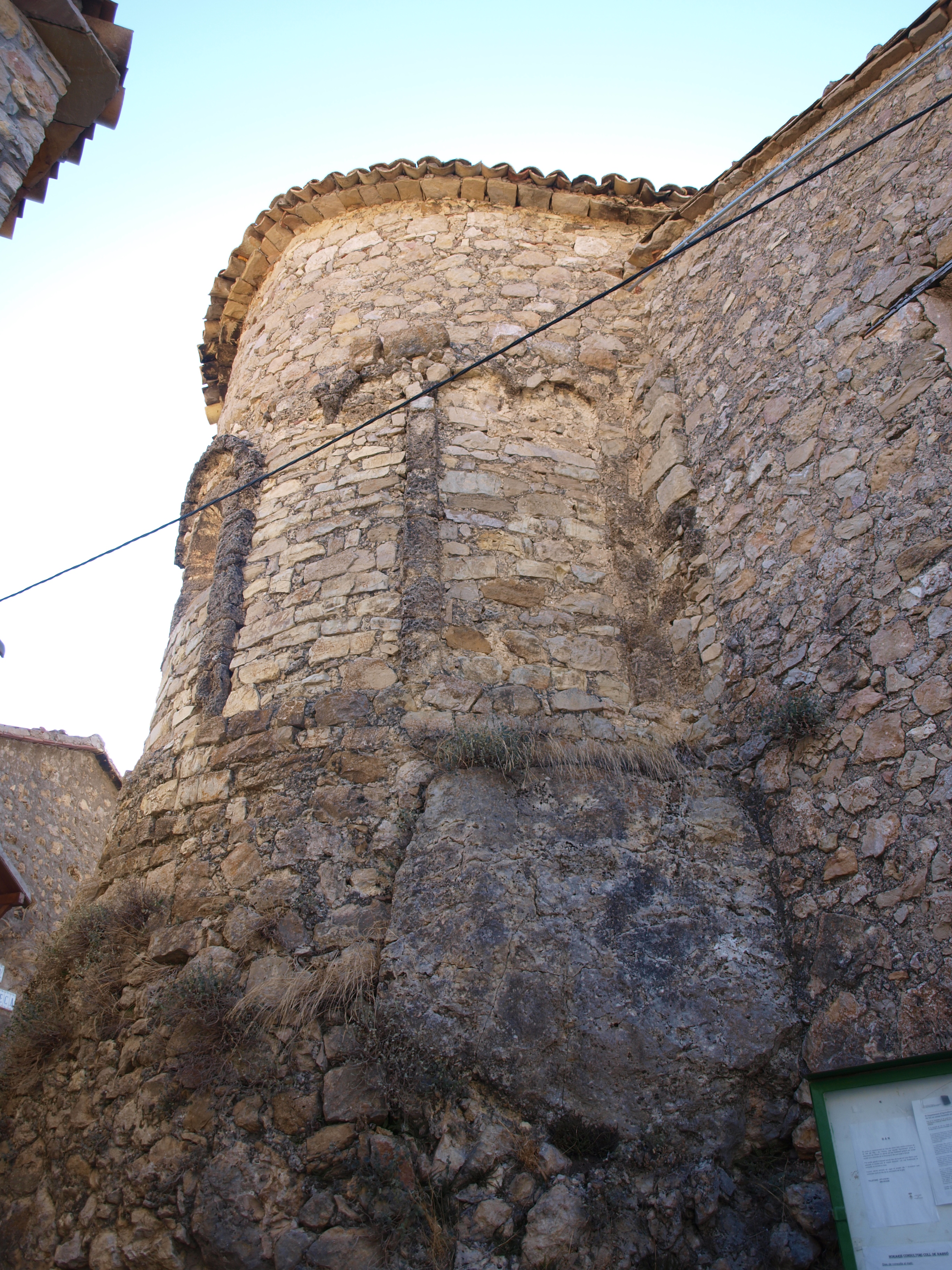 Absis de Sant Bernabé de l'Alzina d'Alinyà